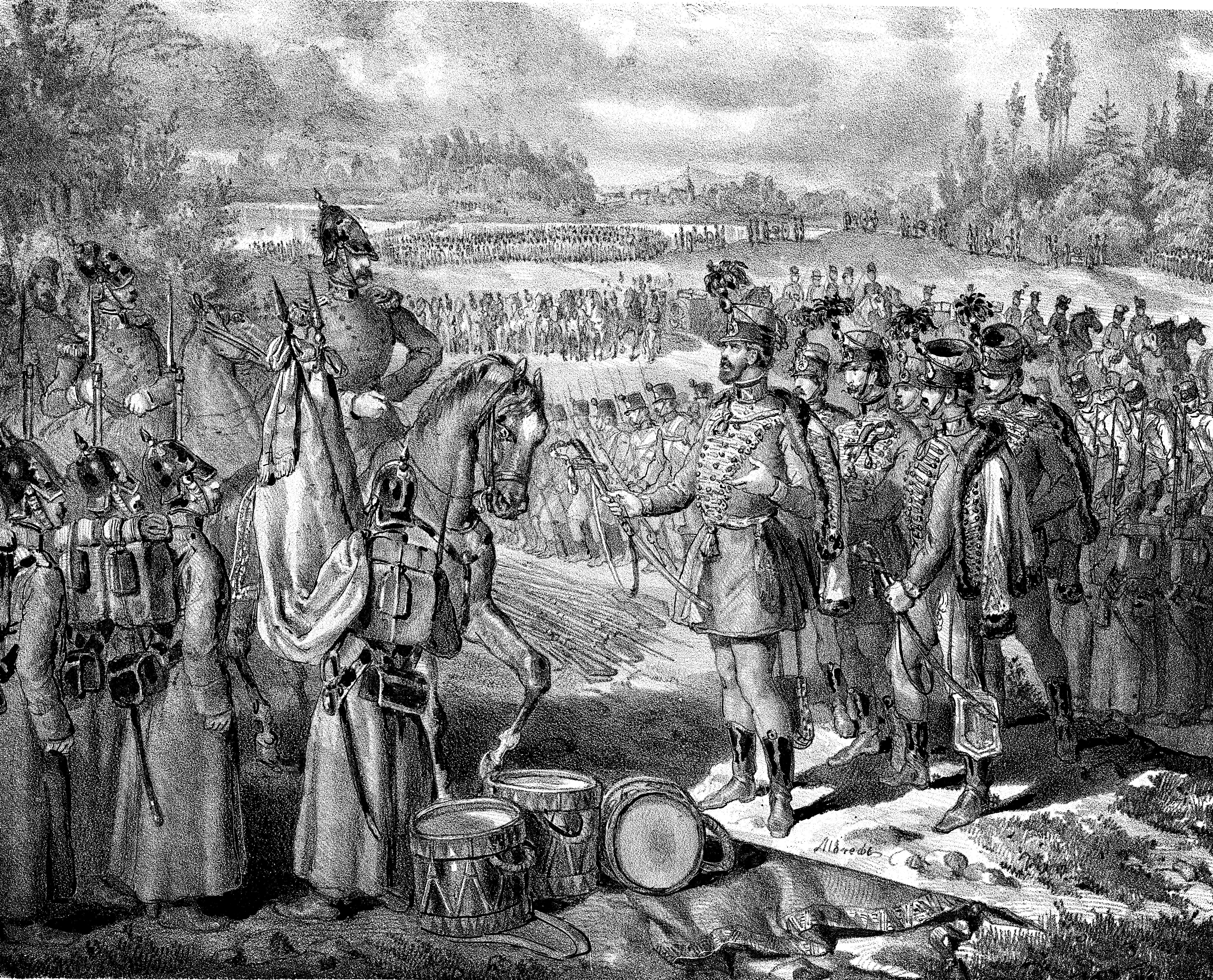 Magyar honvédtiszt átadja a kardját az orosz inváziós hadsereg tisztjének 1849-ben